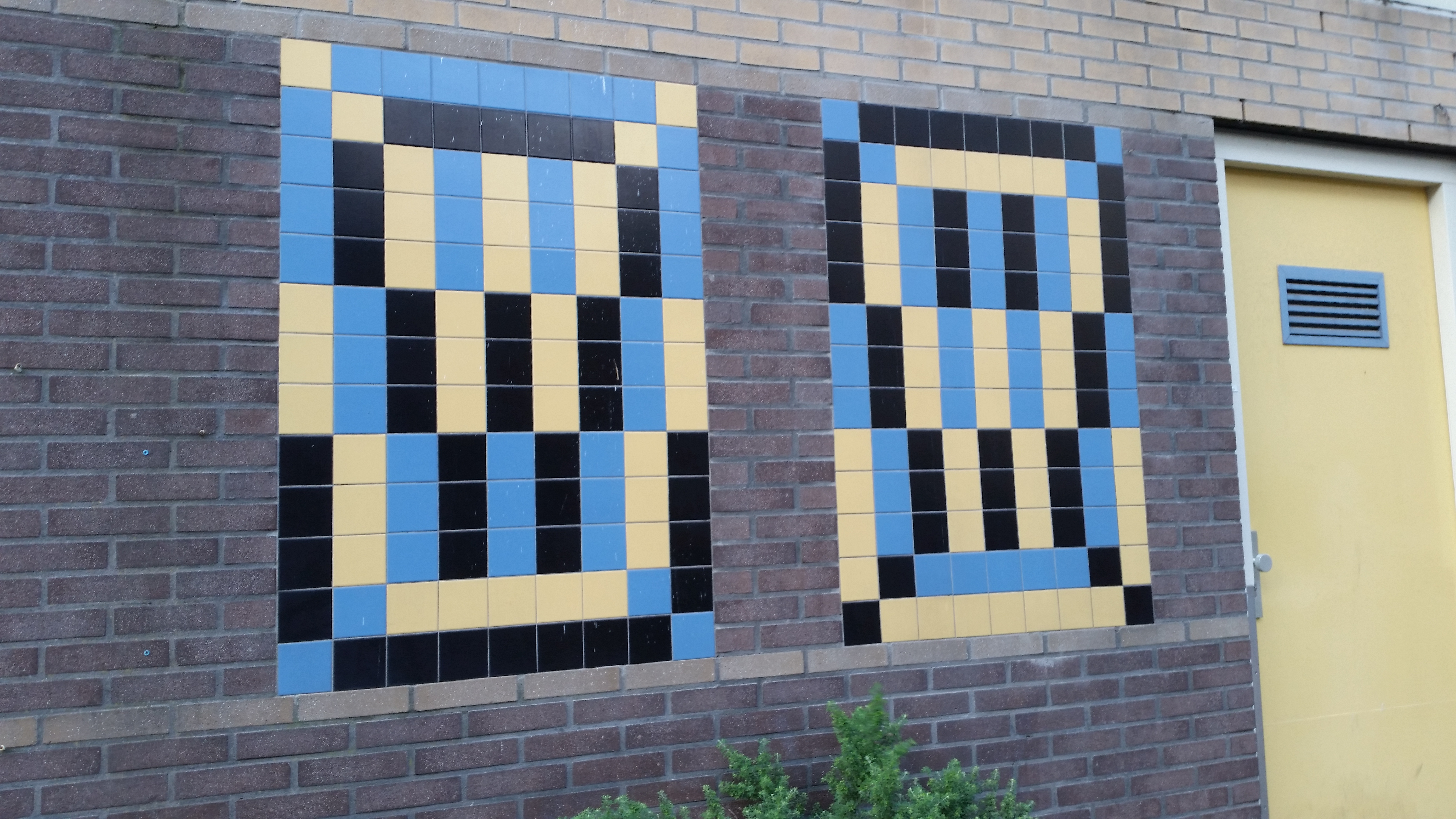 Vijf tableaus in de Jacob van Lennepstraat, hoek Lootsstraat, Amsterdam-West